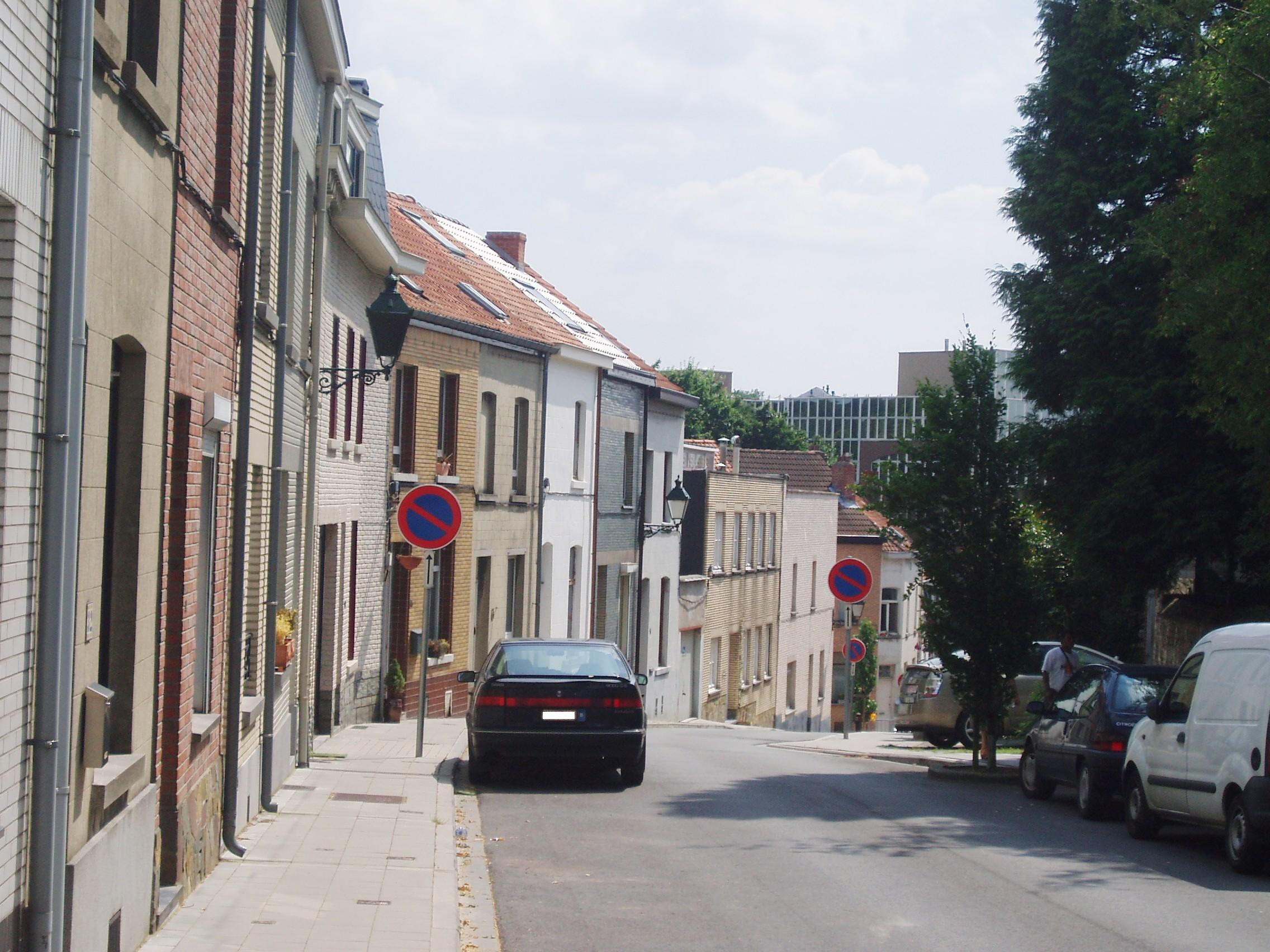 rue des 2 chaussées Auderghem Belgium